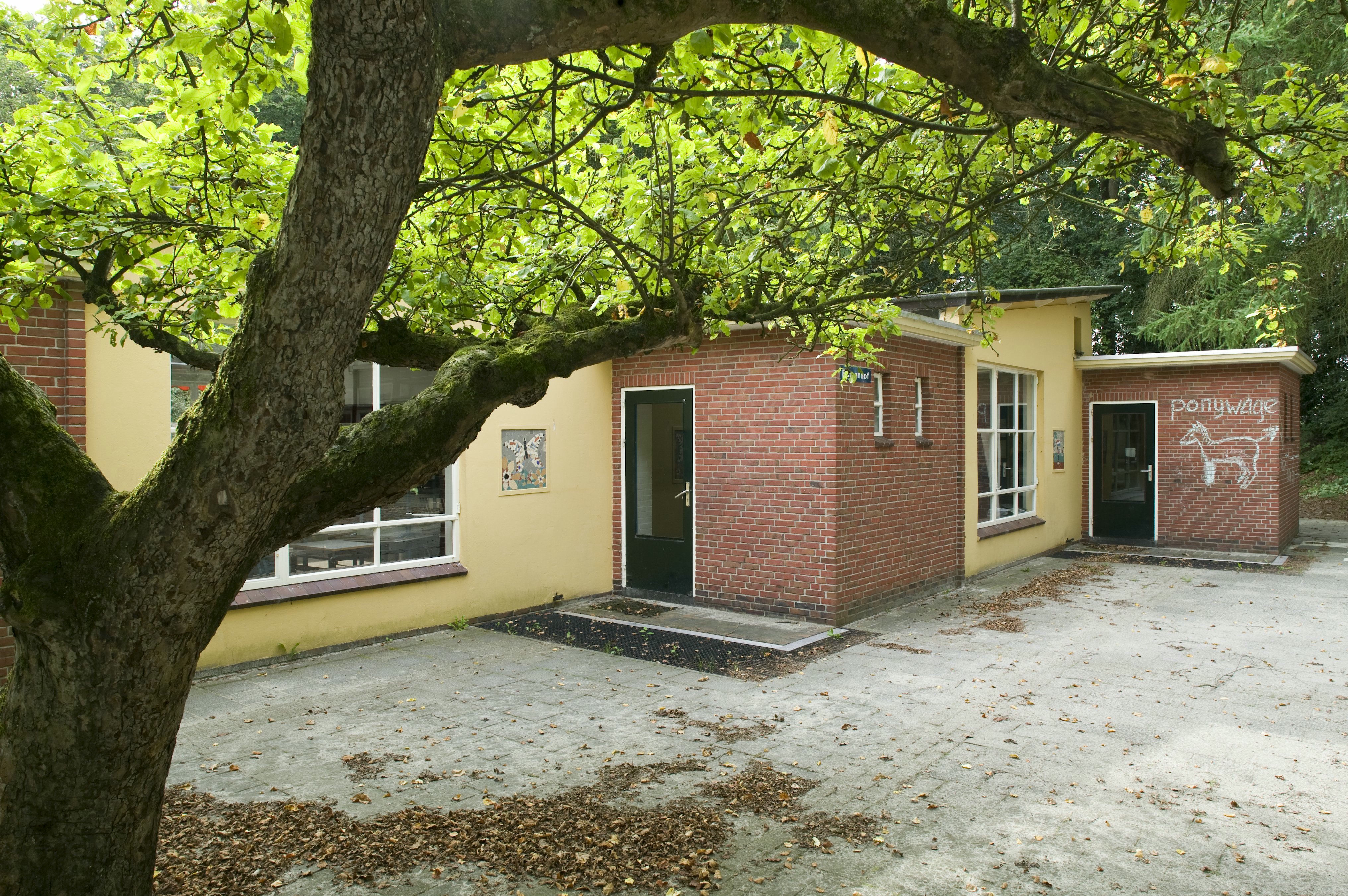 Openluchtschool De Appelbergen: Overzicht van de westzijde (opmerking: Gefotografeerd voor Monumenten van Herrezen Nederland)